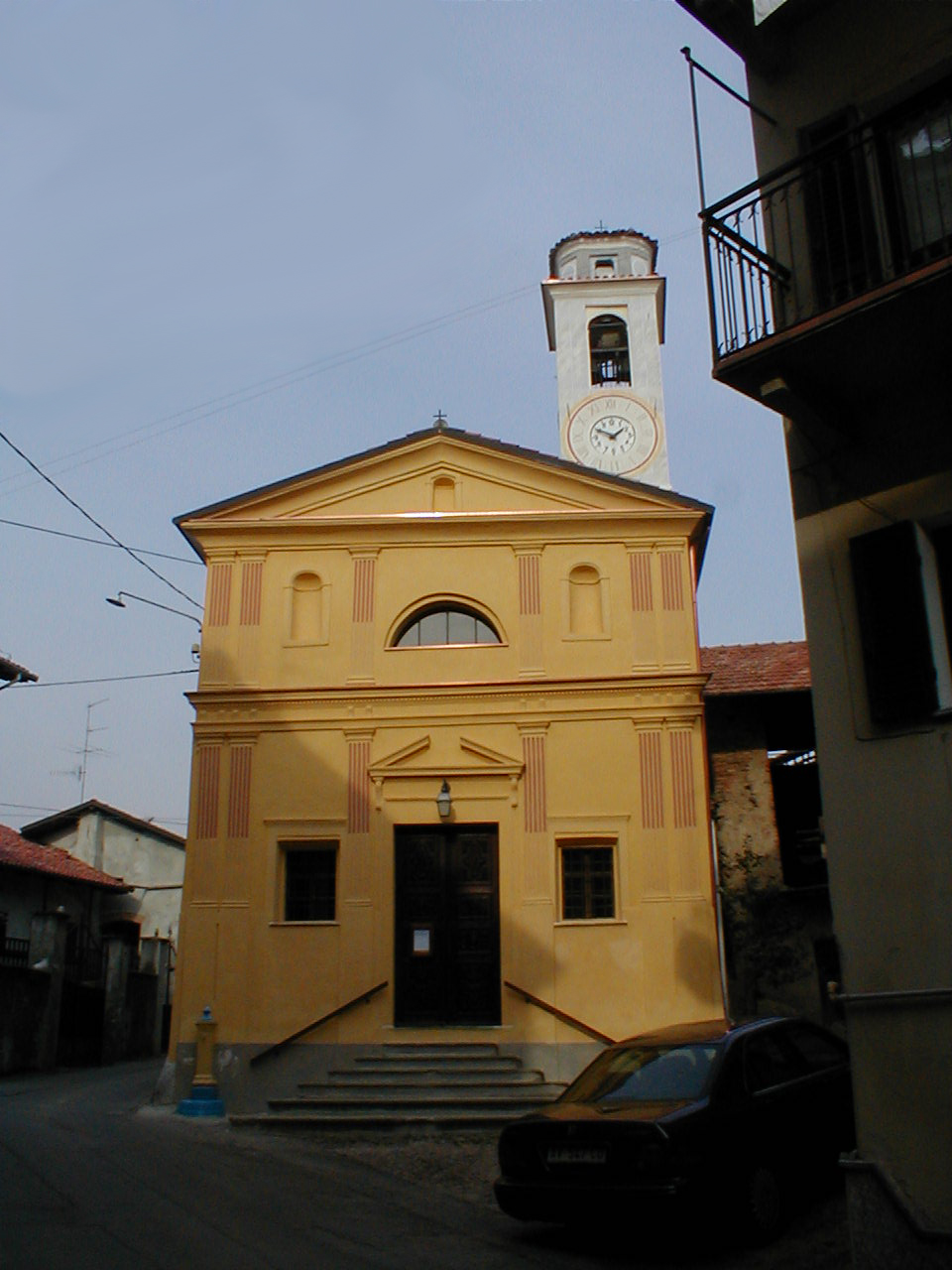 facciata principale dopo i restauri